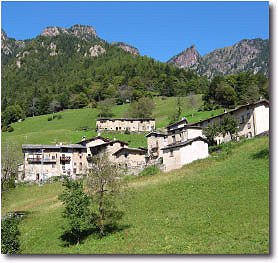 contrada di Pusdosso